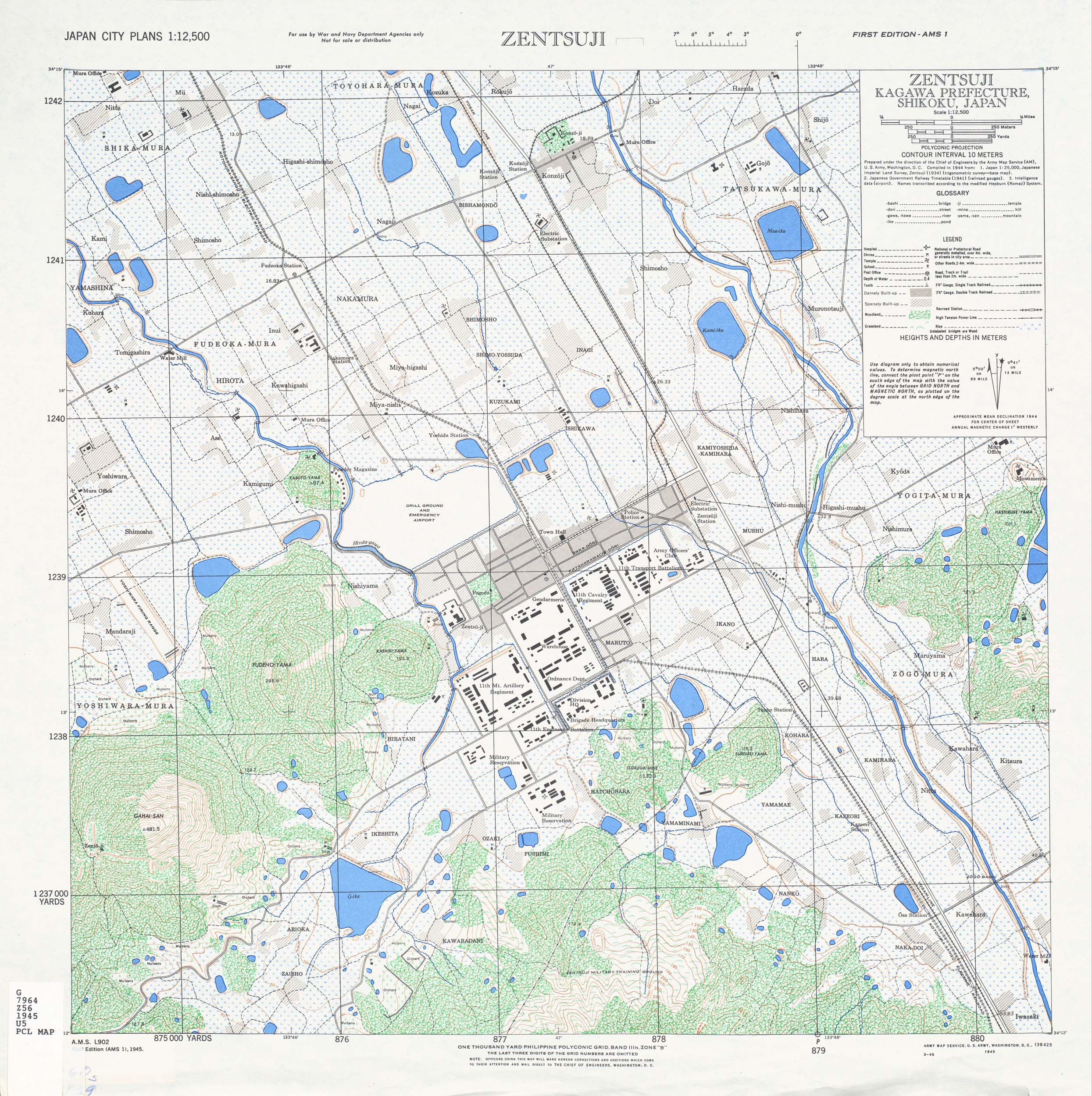 1945年ごろの香川県仲多度郡善通寺町（現在の善通寺市）